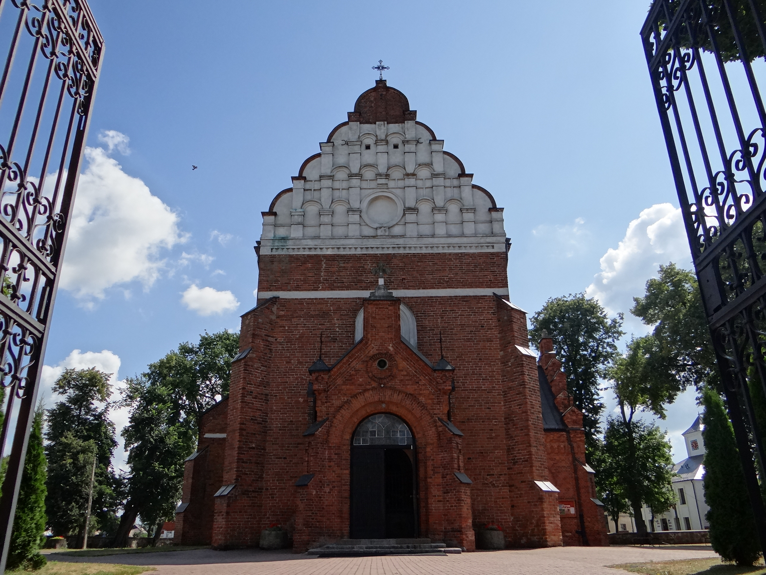 Wejście główne 2